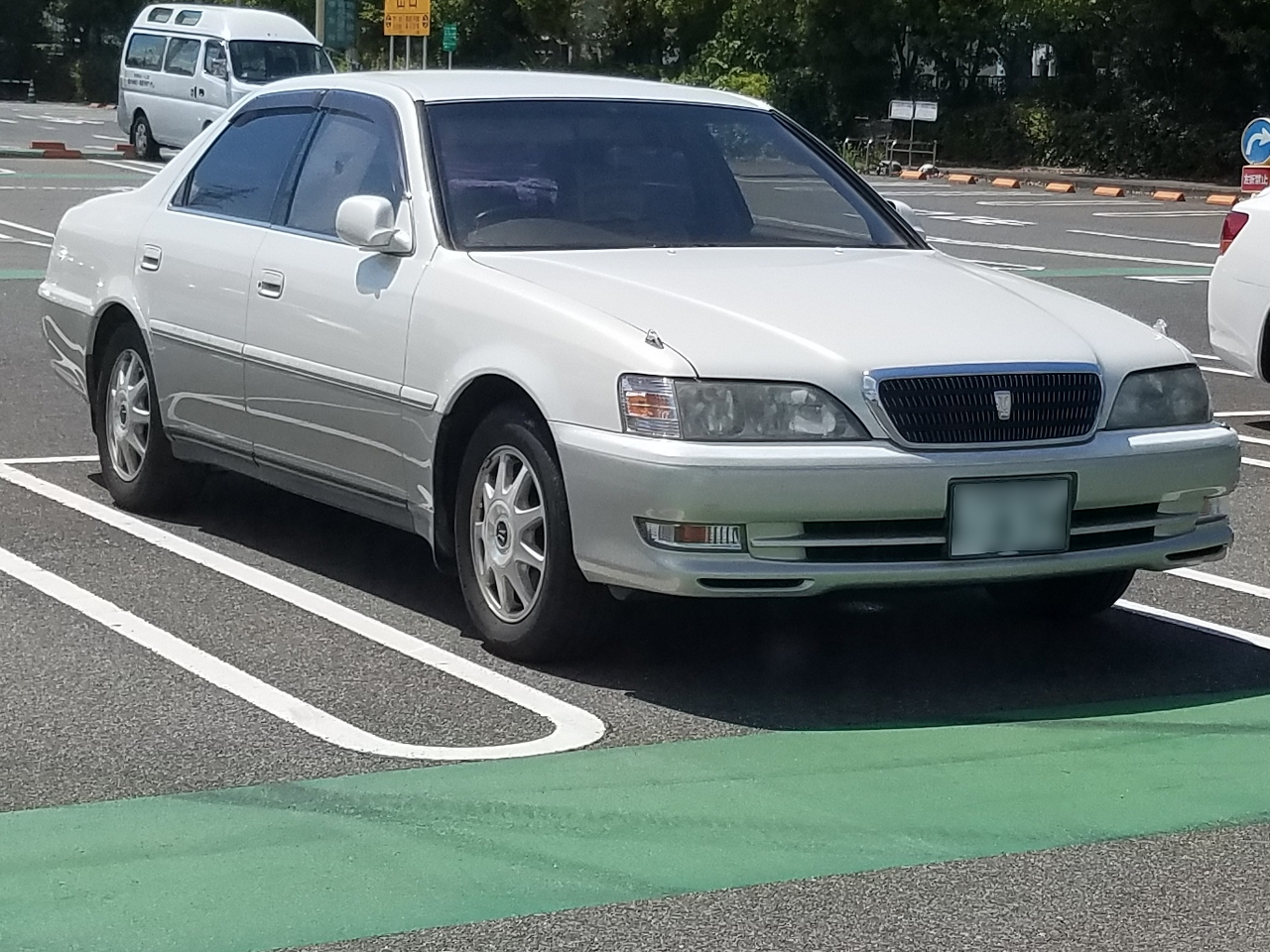 クレスタ 2.5エクシードG（後期型）